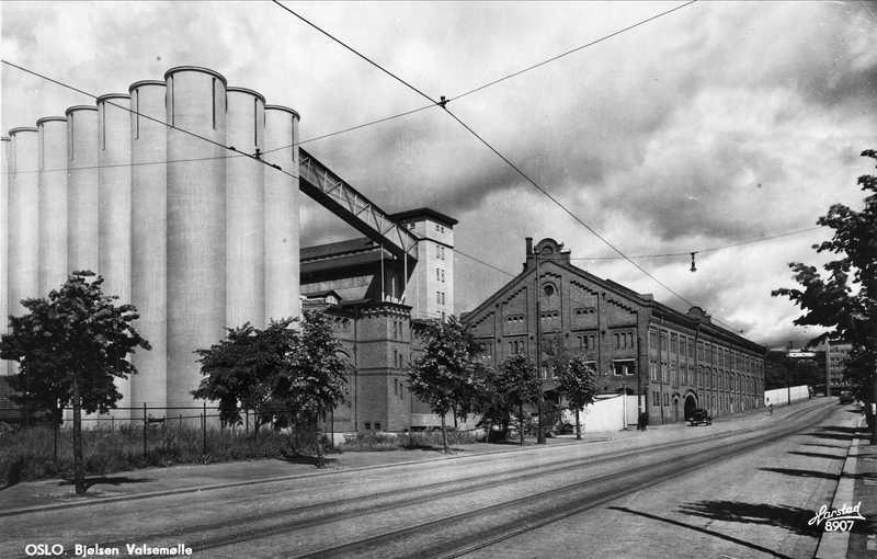 Bjølsen Valsemølle in Oslo, Norway